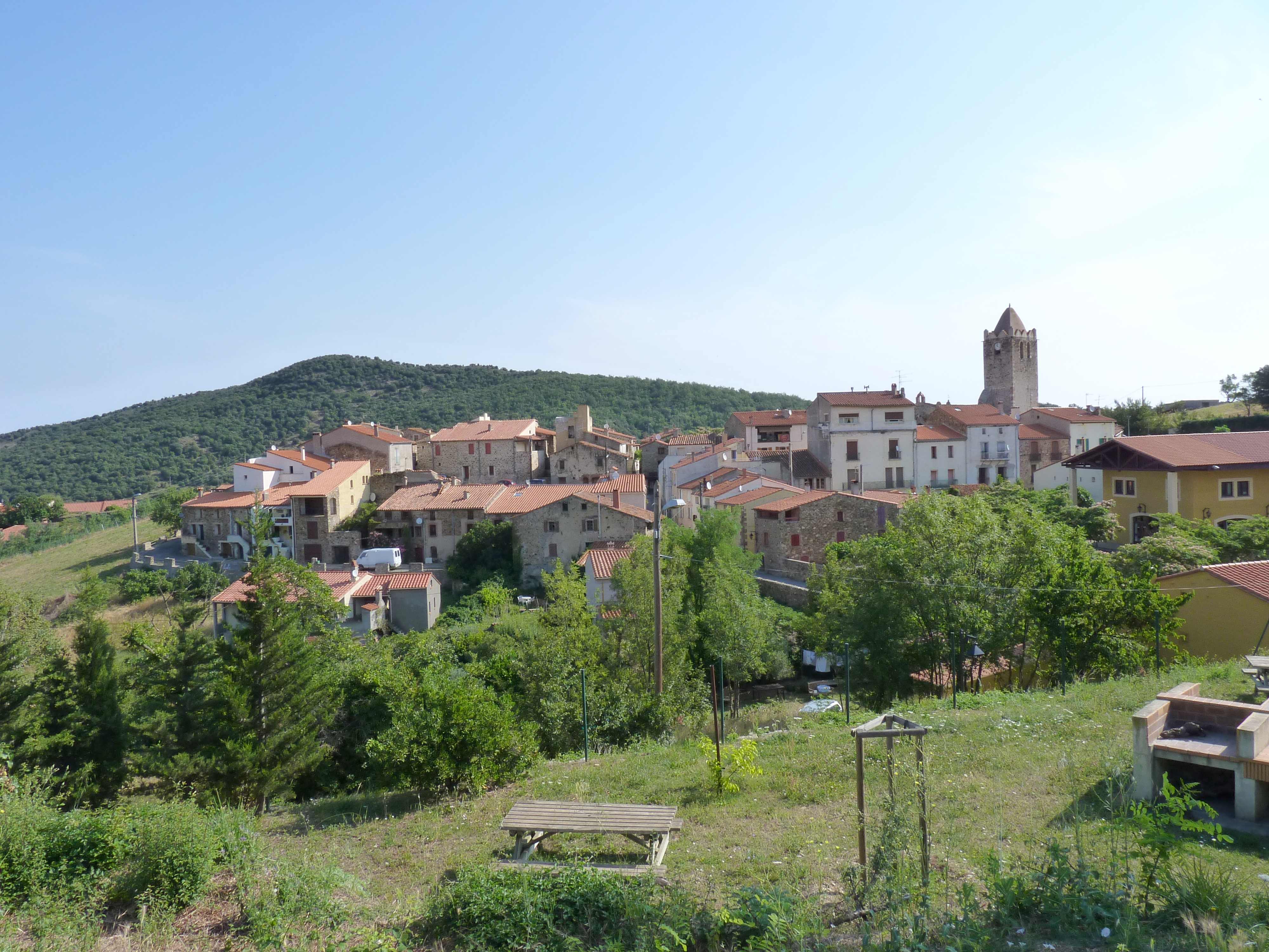 Vue générale du village, Oms (Pyrénées-Orientales, Languedoc-Roussillon, France)